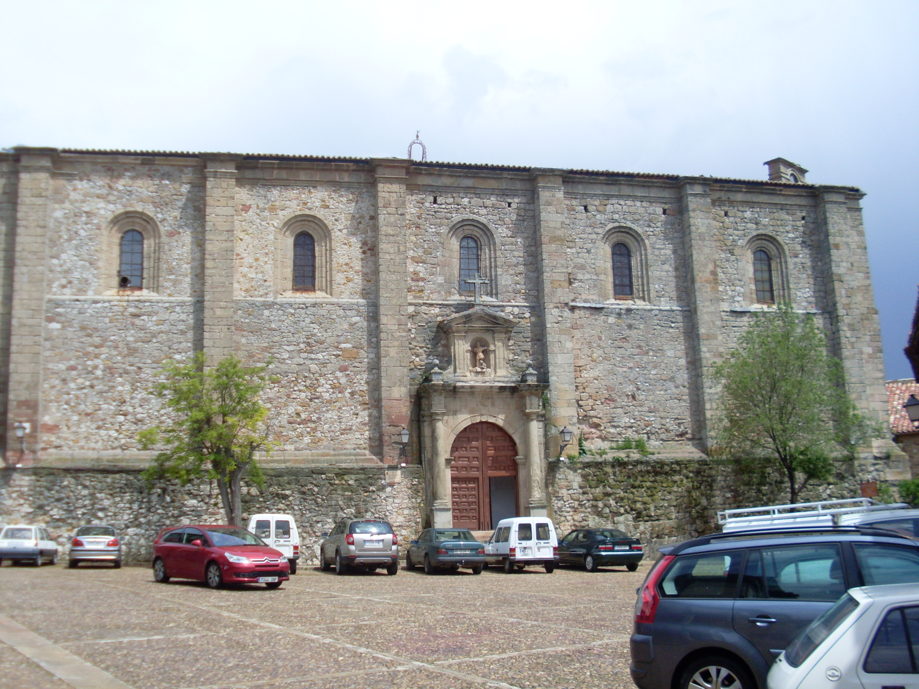 Atienza, Guadalajara (España)